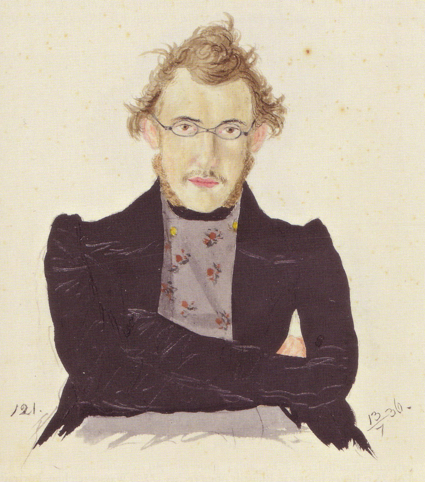 Porträtaquarell von Reinhold (oder Reinhard) Moritz Horstig